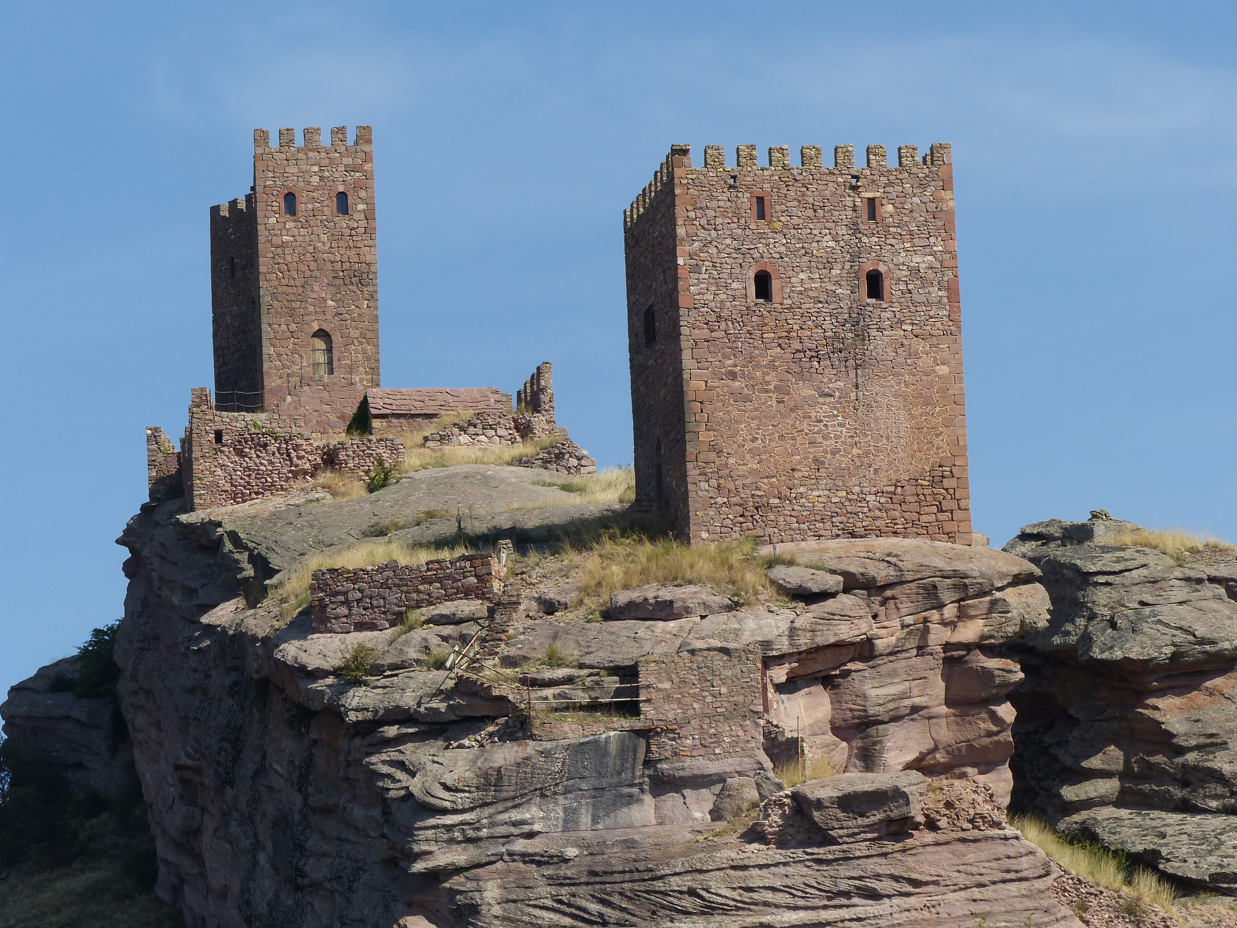 Castillo de Zafra, Guadalajara, España